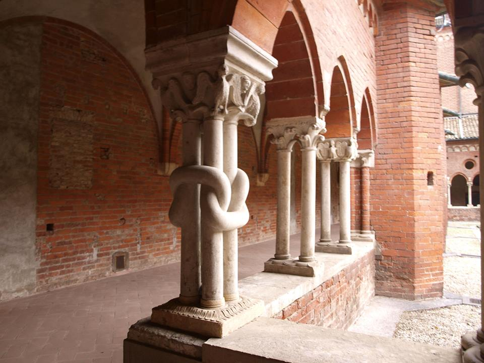 A Chiaravelle-apátság belső kerengőjének részlete, Milánó